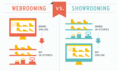 Sự khác nhau giữa hành vi Showrooming và Webrooming